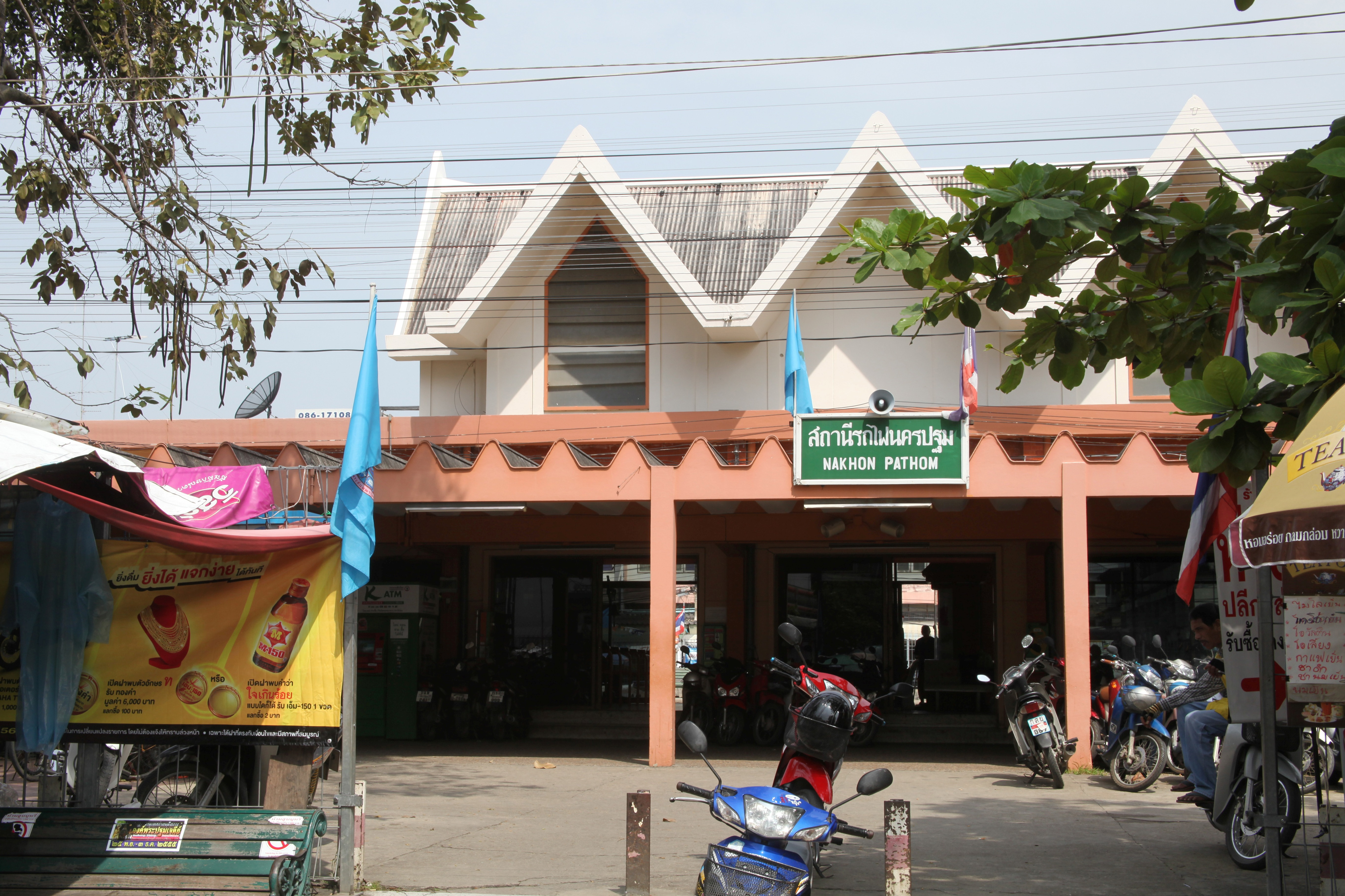 ナコーンパトム駅